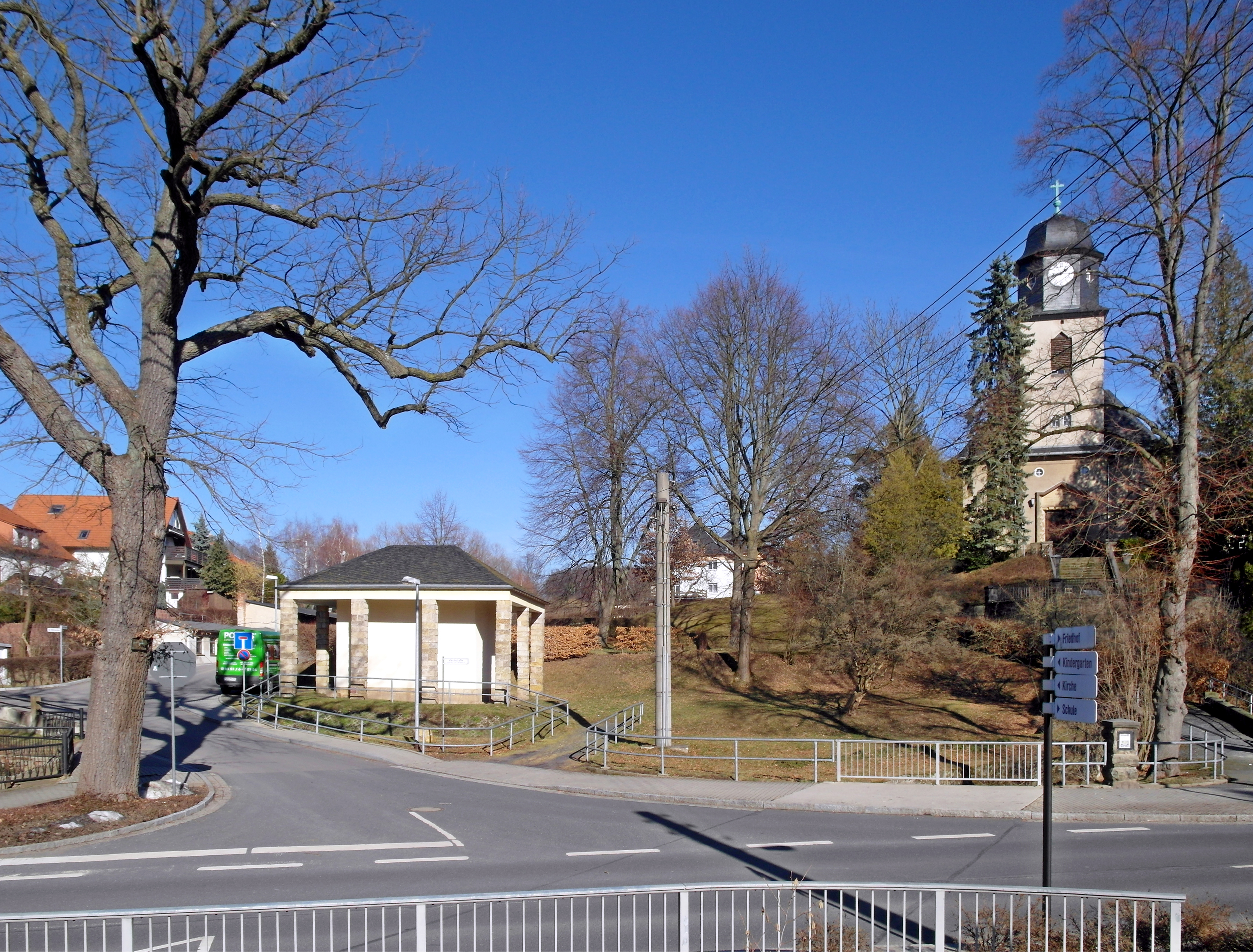 18.02.2019 01734 Oelsa (Rabenau): Evangelische Kirche Oelsa, Pfarrweg 2 (GMP: 50.950678,13.666927). Die schlichte Saalkirche entstand 1928. Sicht von Südwesten. [SAM9609.JPG]20190218500DR.JPG(c)Blobelt